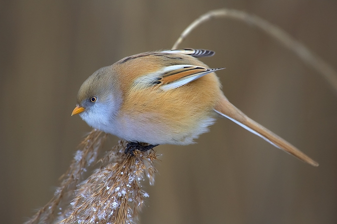 Panurus biarmicus (female), Chomoutov, Czech Republic